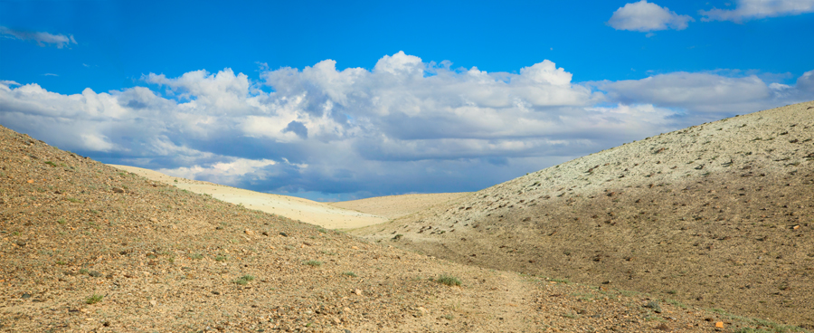 чуйская степь в районе реки Тыдтуярык